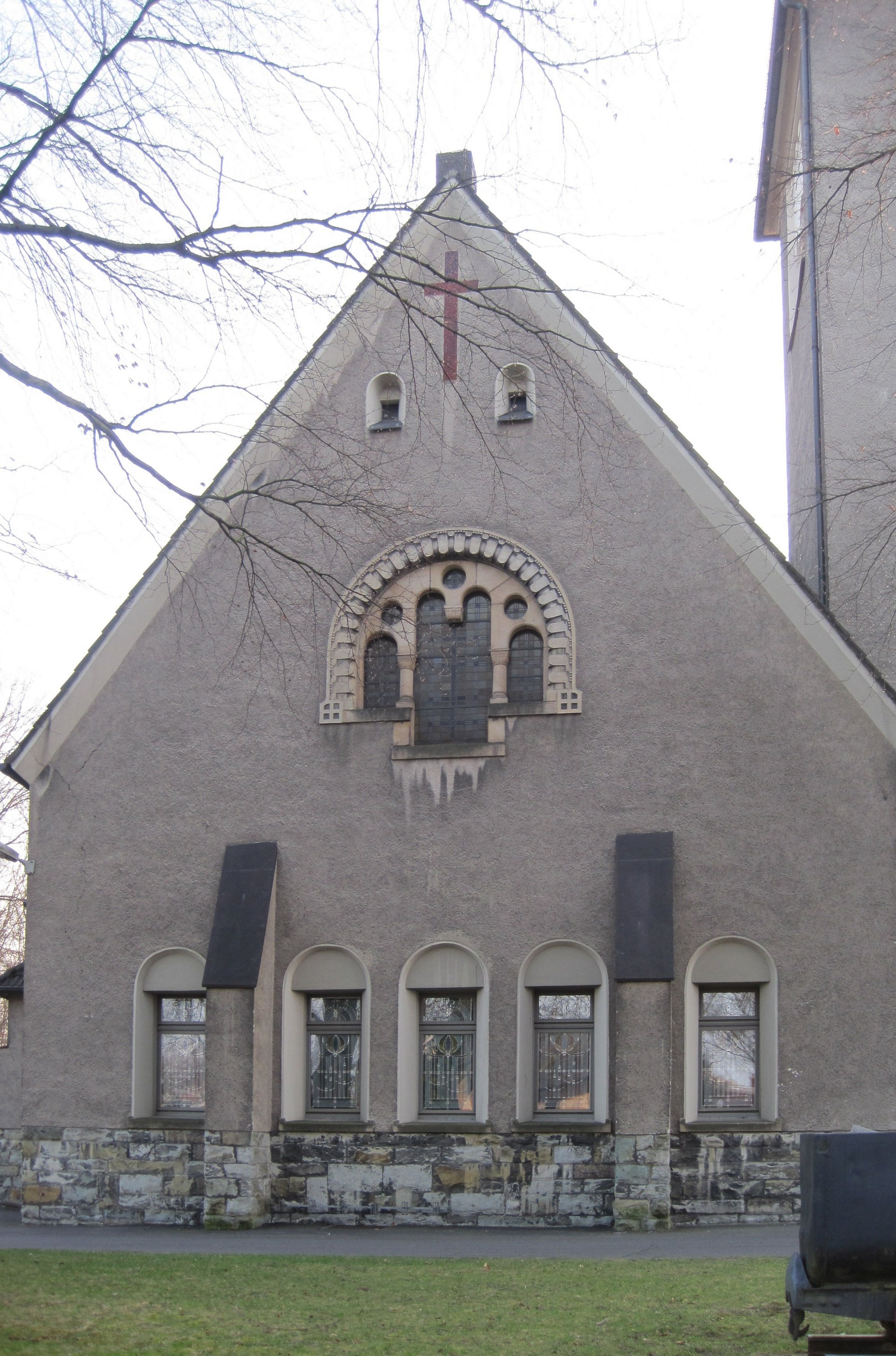 Das Foto zeigt die Kreuzkirche in Hamm-Bockum-Hövel.